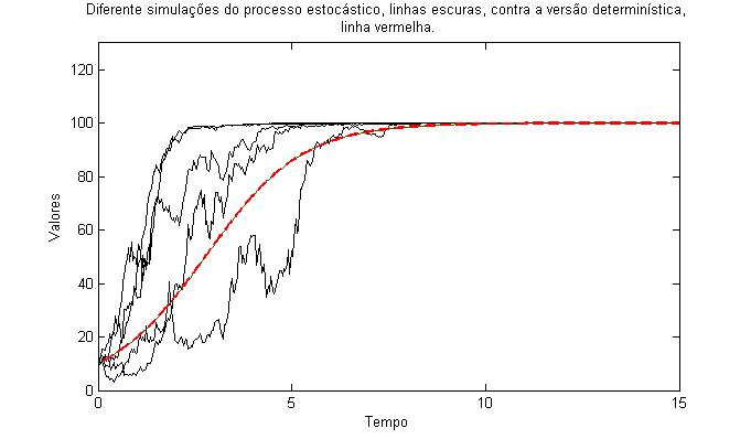 Diferentes realizações de uma equação diferencial estocástica usando o método de Euler-Maryuma.